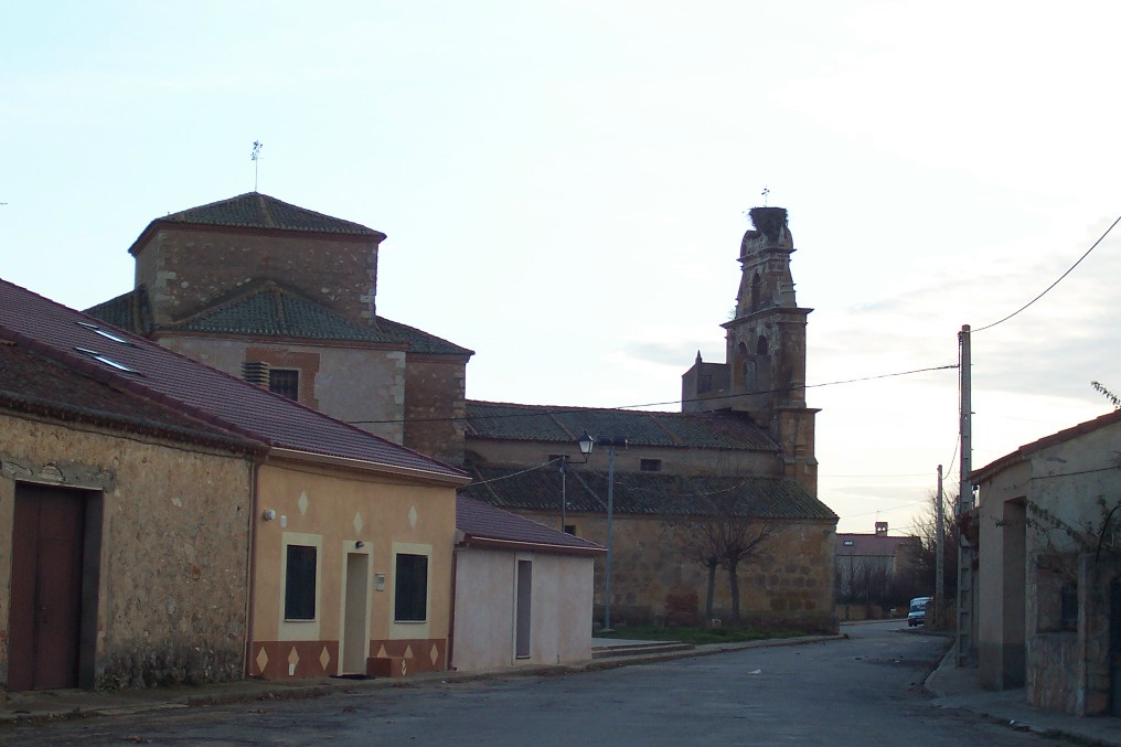 Cascajares